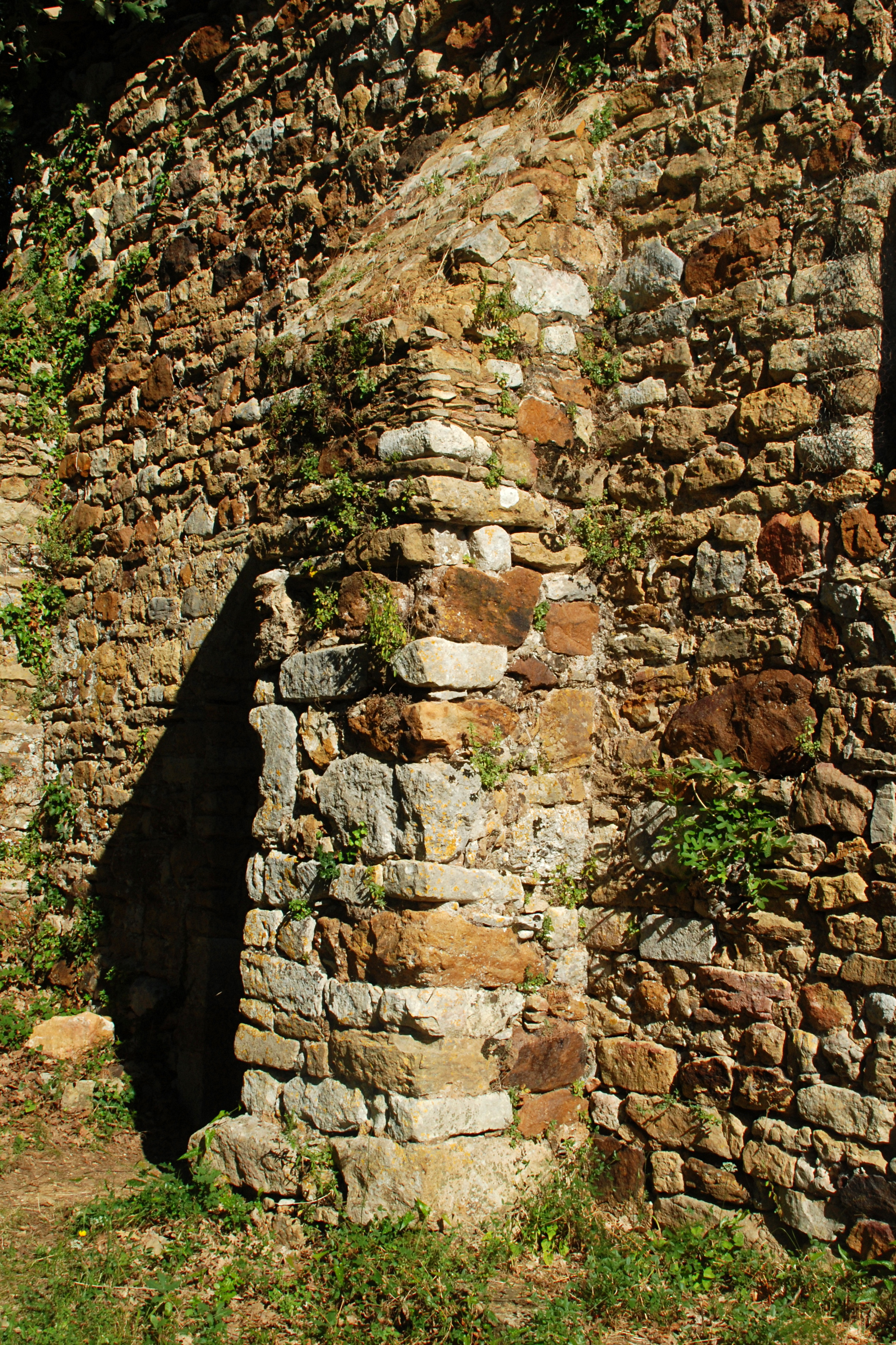 France - Gard - Chapelle Saint-Saturnin de Gaujac